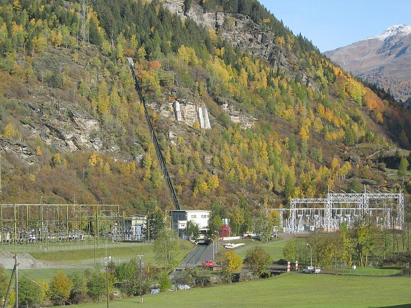 Kraftwerk Robbia, Poschiavo (CH-GR)